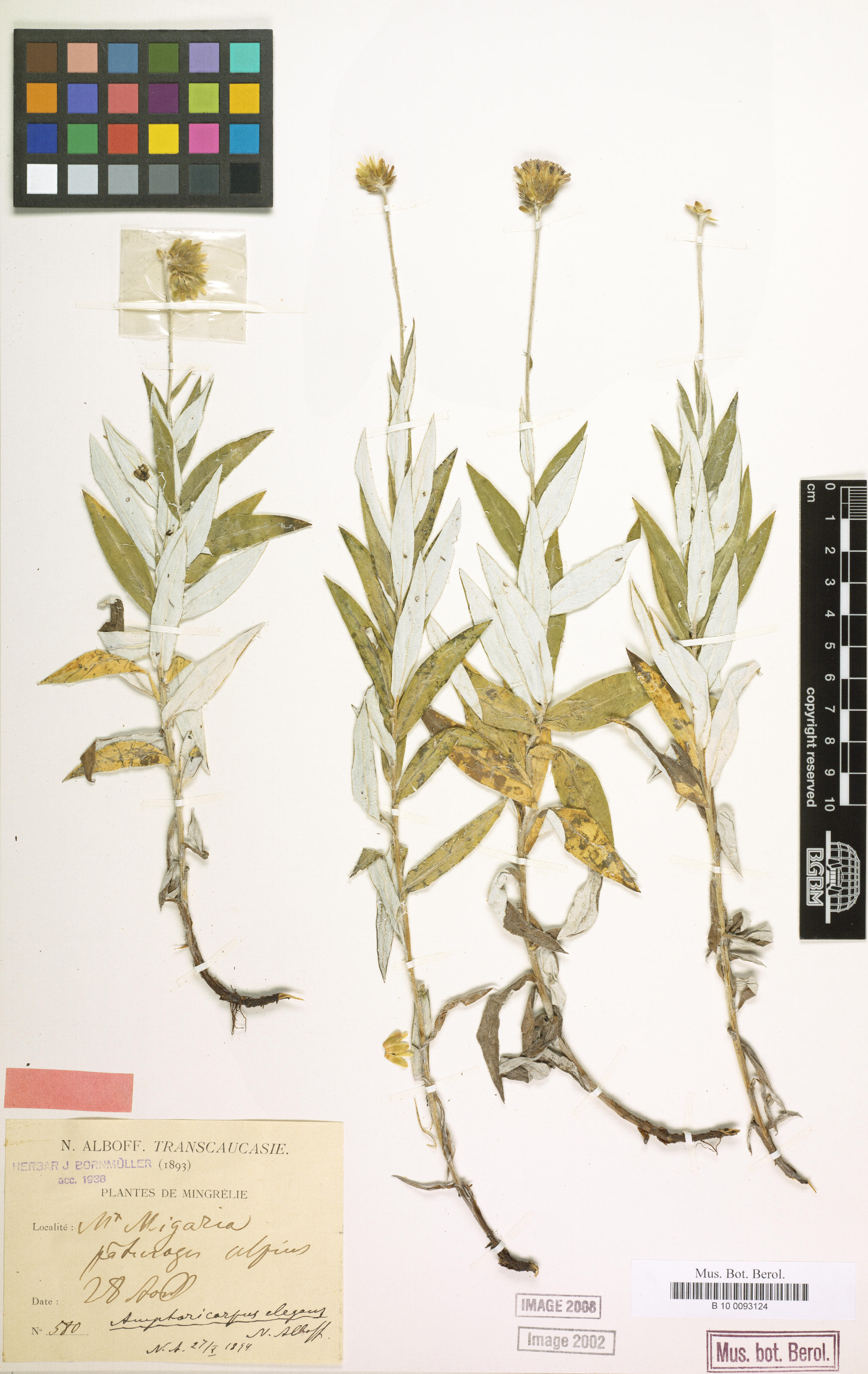 Amphoricarpos elegans - Mt Migaria (Georgia).